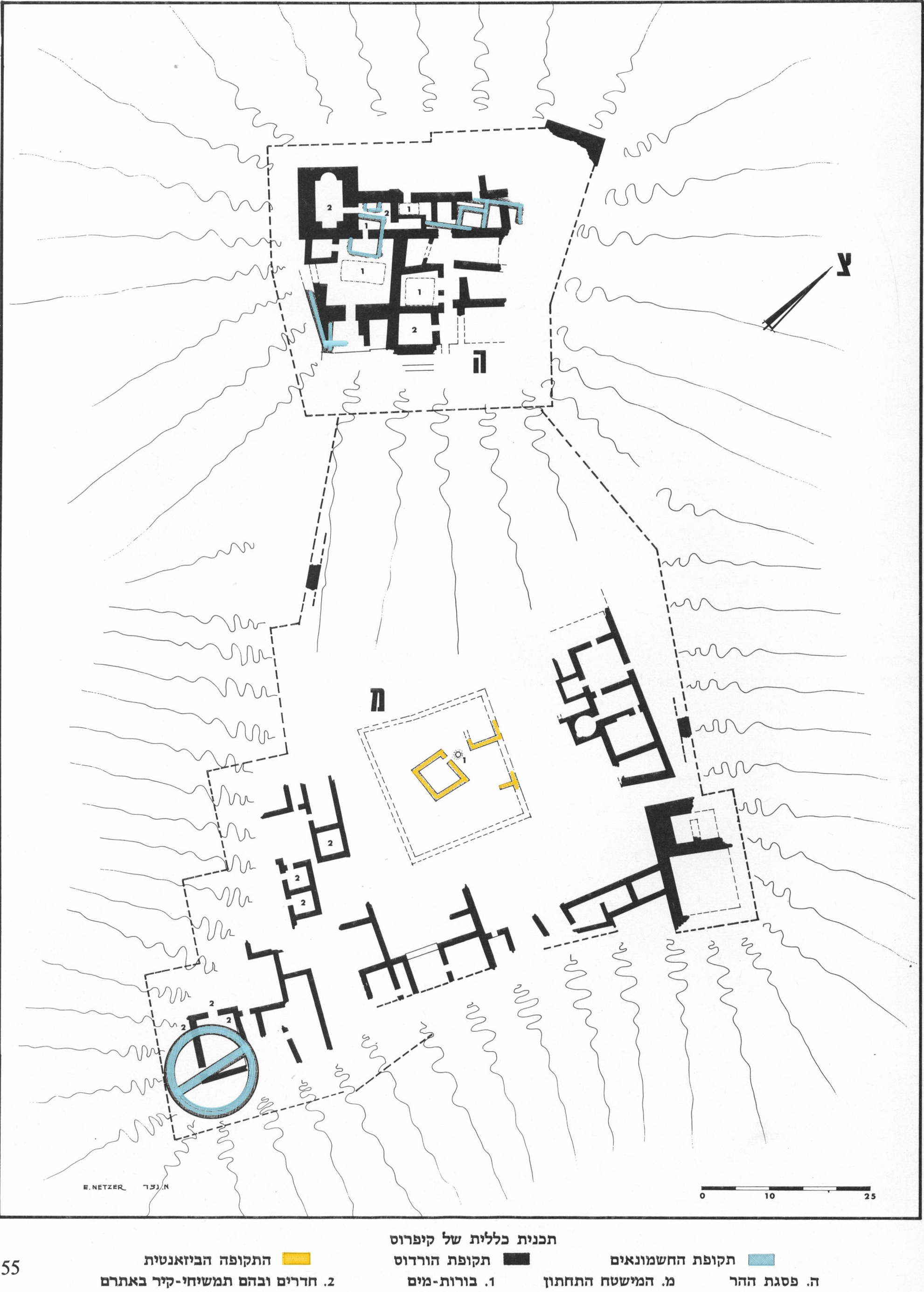 הממצאים הארכאולוגיים באתר